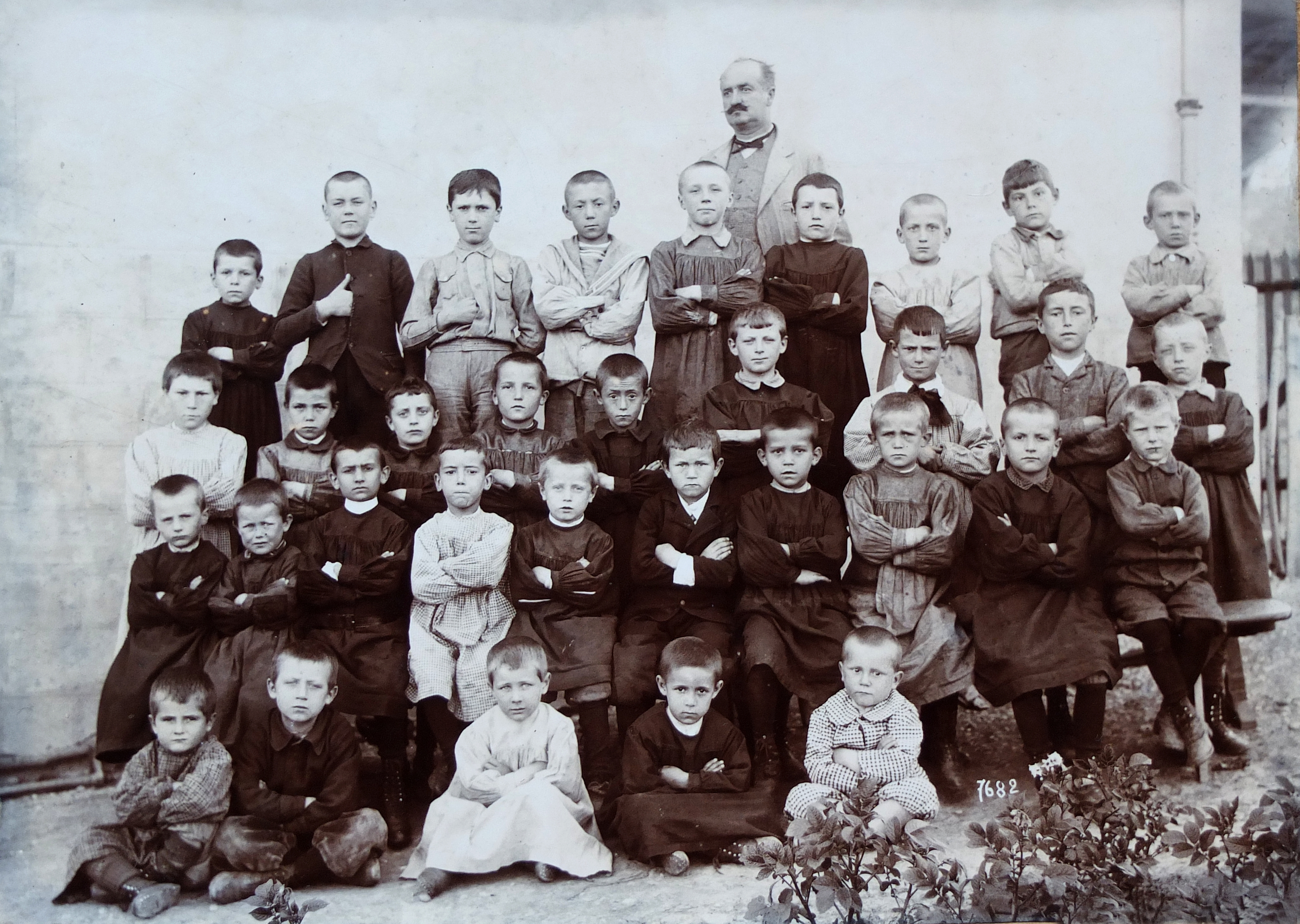 Photographie d'un groupe d'écoliers, lieu non déterminé, photographe Nicolas Dominger, Nancy. Vers 1890. Dimensions cliché 11,5 x 16,5cm. Collection privée.